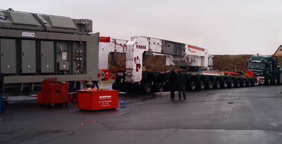 Zusammenstellen eines Schwertransports (Transformator eines Energieversorgers)